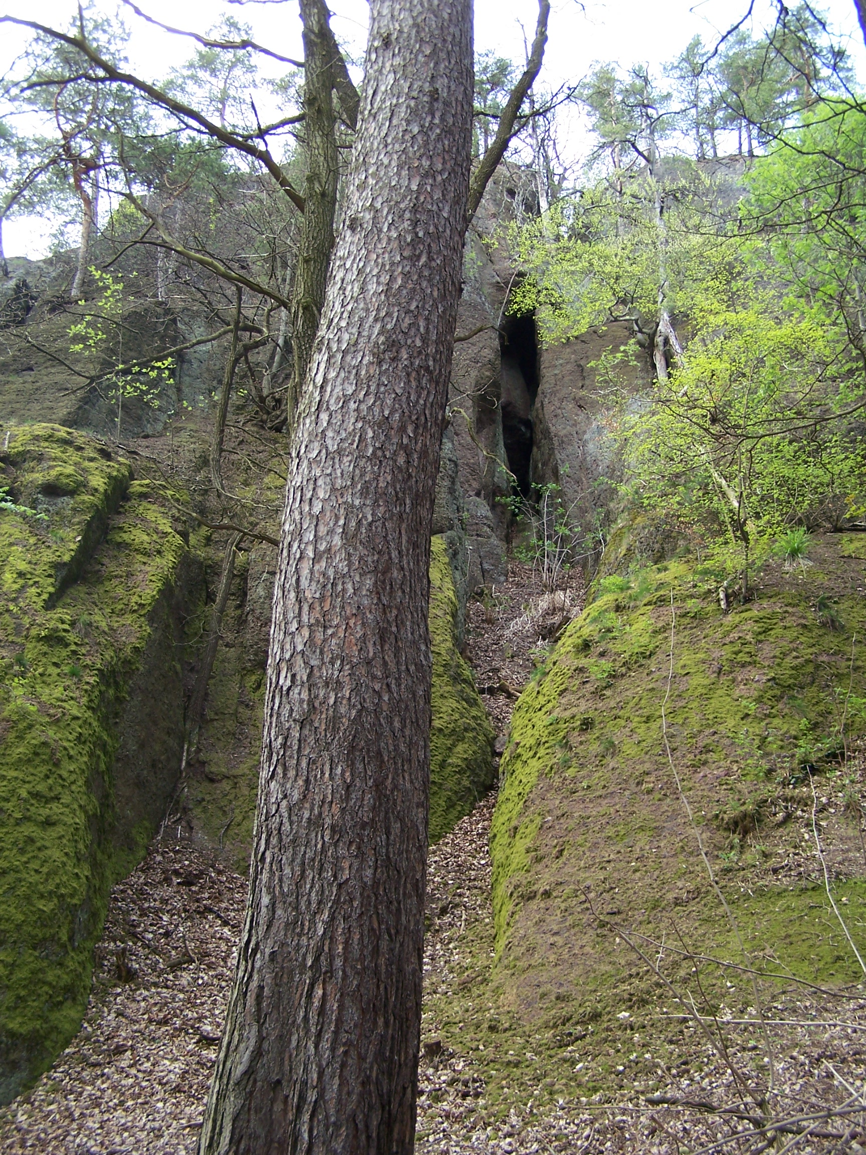 Jungfernloch